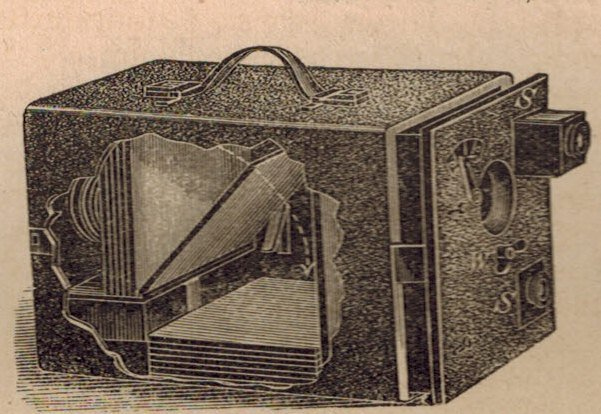 Momenthandcamera mit magazin